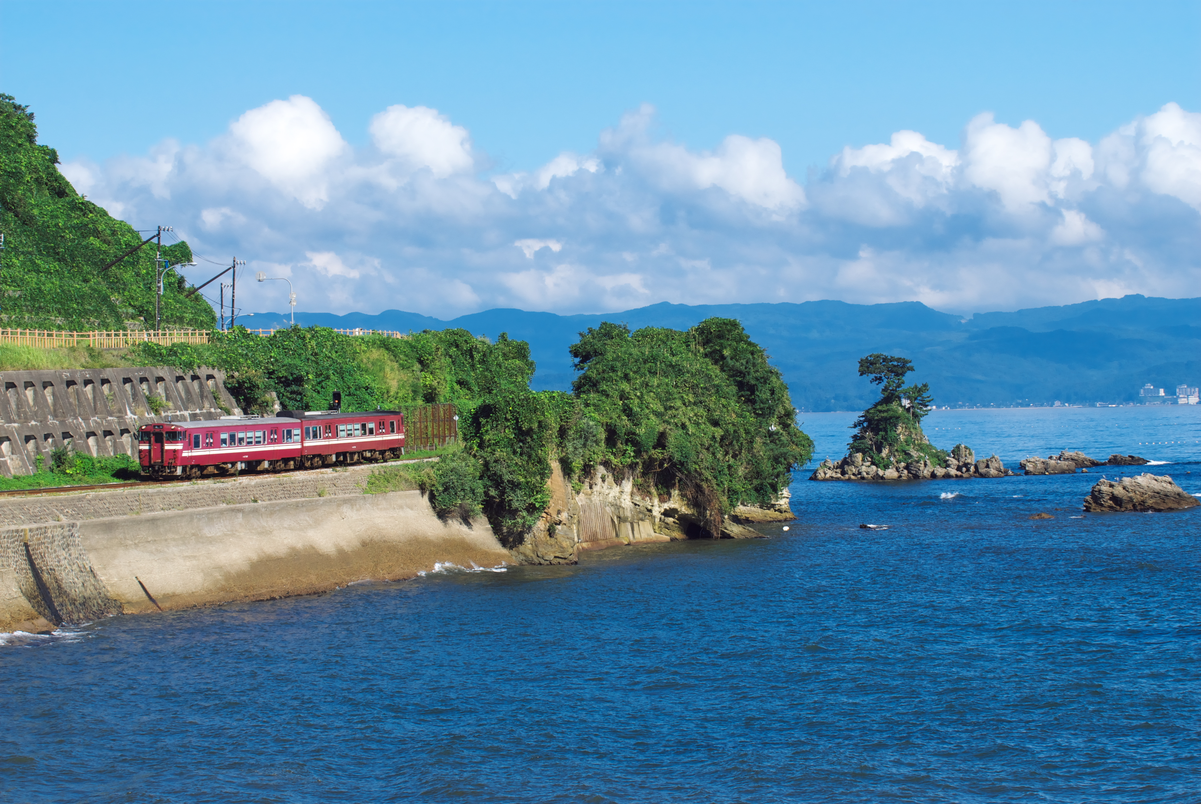 雨晴海岸を走る、氷見線 2008.8.31 氷見線 越中国分〜雨晴